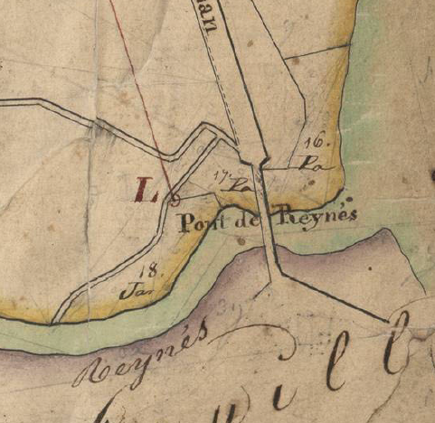 El Pont de Reiners en el Cadastre napoleònic del 1812 (Arxius Departamentals dels Pirineus Orientals)